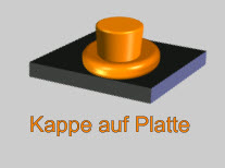 Verbindung Kappe auf Platte